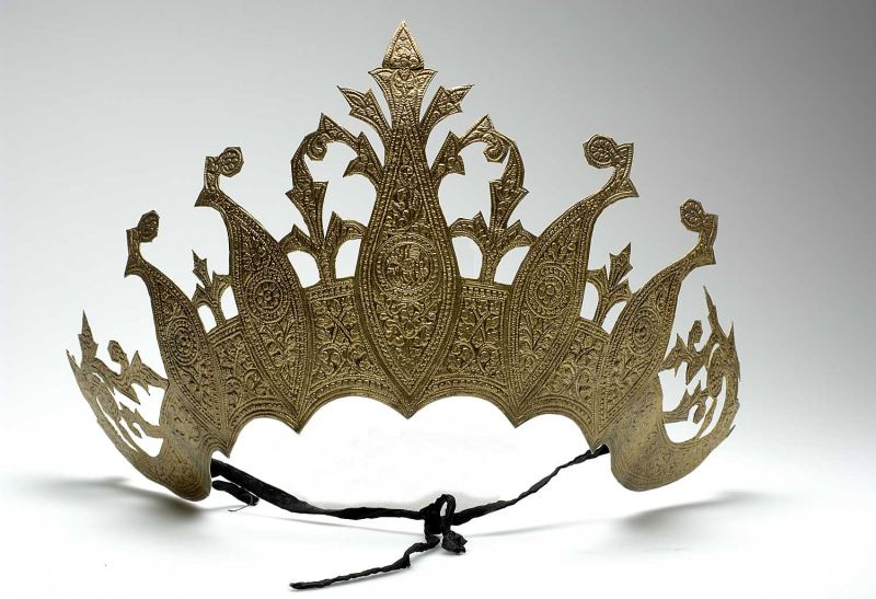 Hoofdsieraad (onderdeel). Vergulde messing diadeem behorende bij hoofdtooi Unknown language: Singkar sukun Pa sangko Lengkar suon